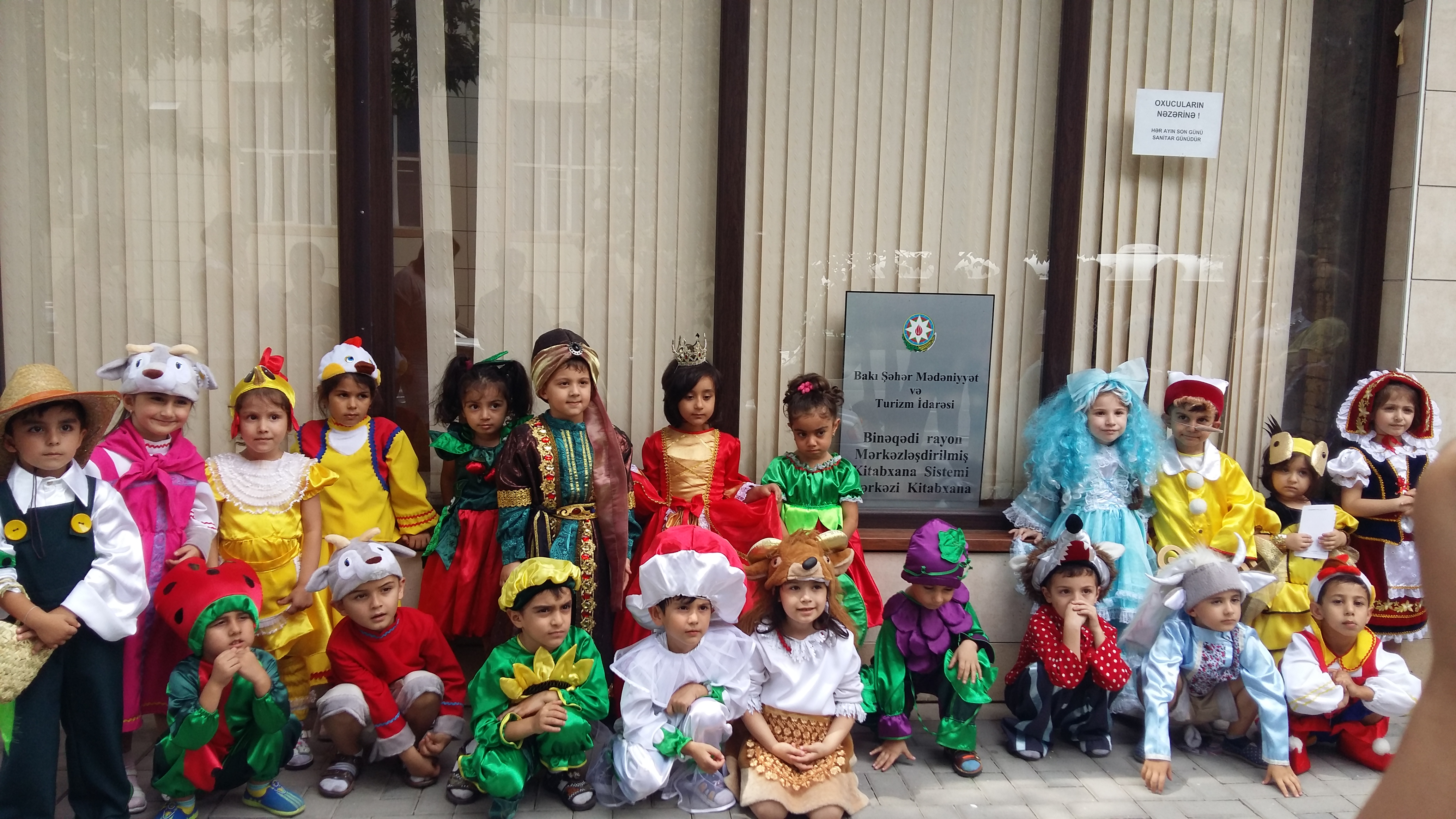 Binəqədi rayon Mərkəzləşdirilmiş Kitabxana Sistemi (MKS)